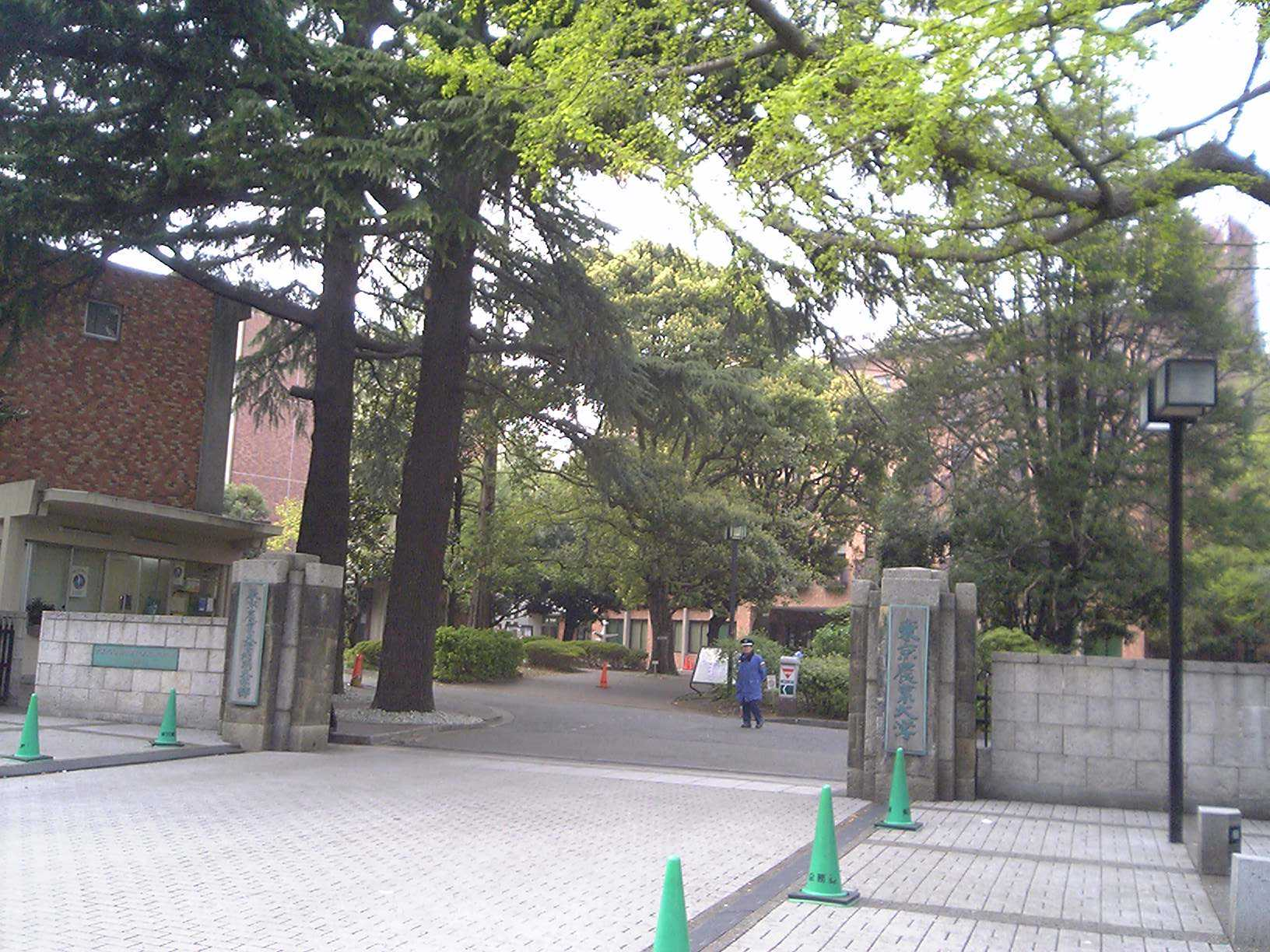 東京農業大学（2006年4月16日投稿者が撮影）